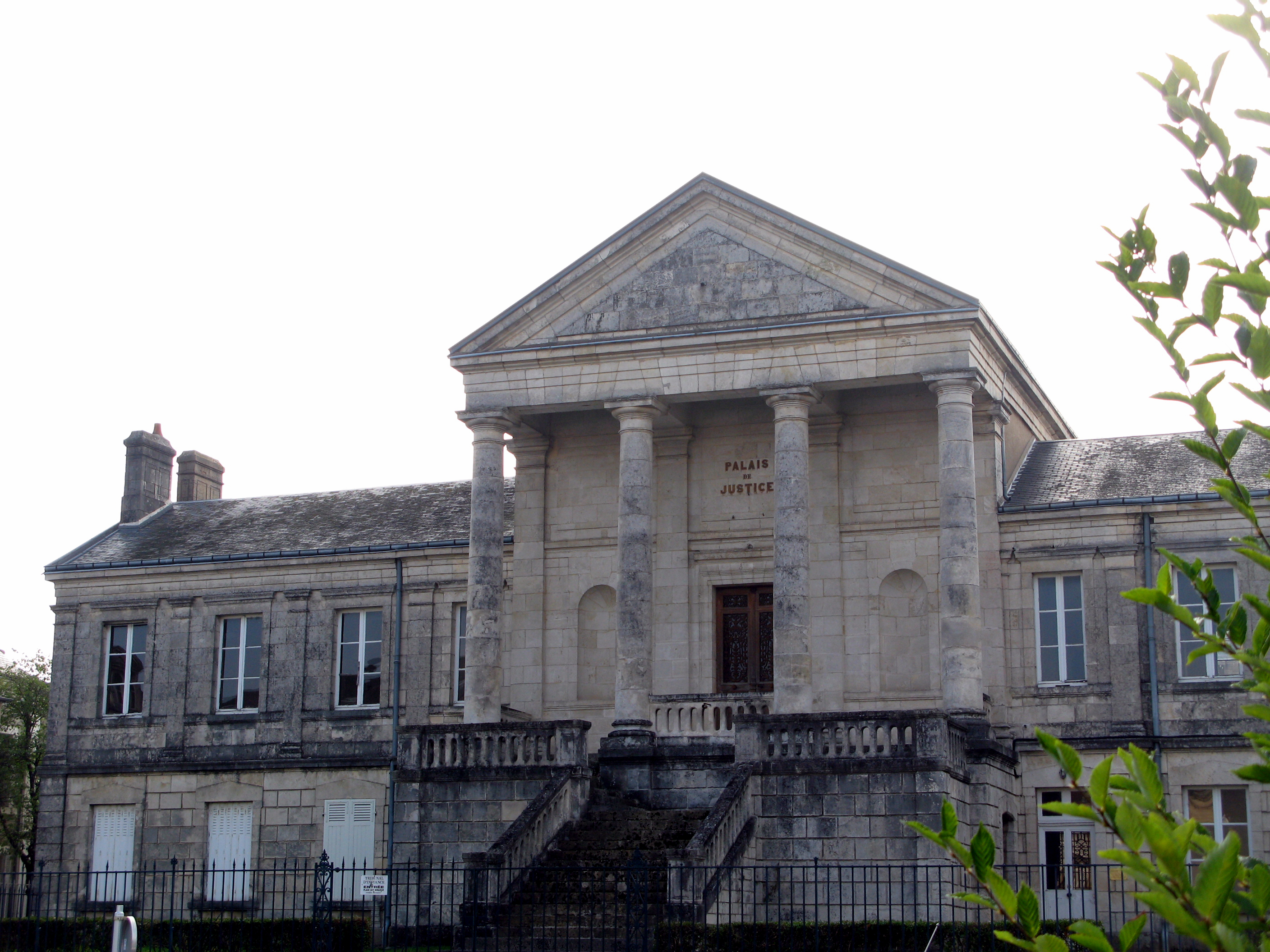 La Châtre (Indre, France) - Le palais de justice. . .